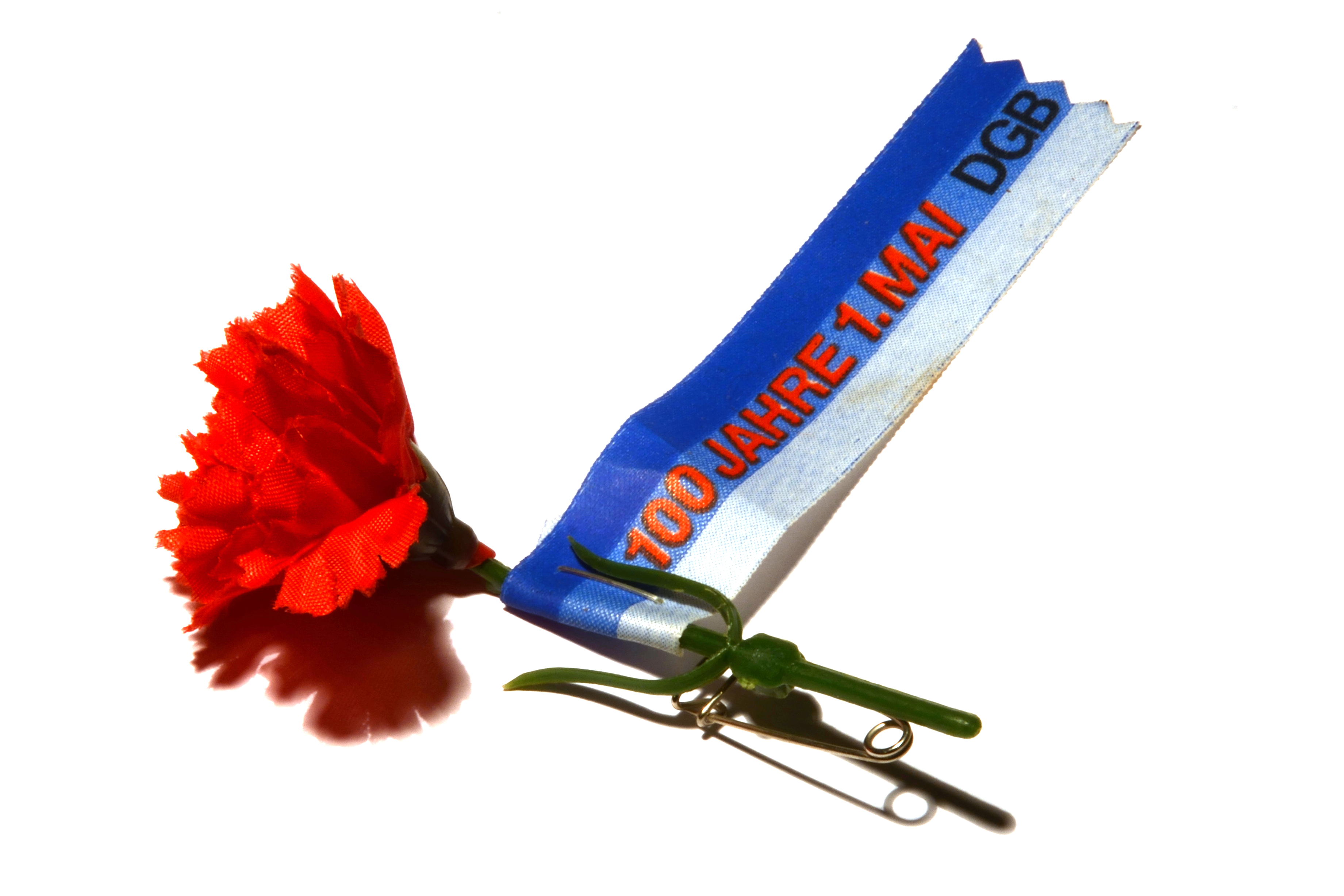 Die "Mainelke" als Symbol der Gewerkschaften zum " Tag der Arbeiterbewegung", verteilt zum ersten Mai